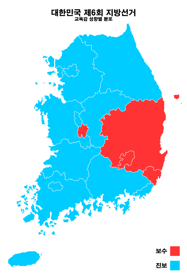 대한민국 제6회 지방선거, 교육감 성향별 분포